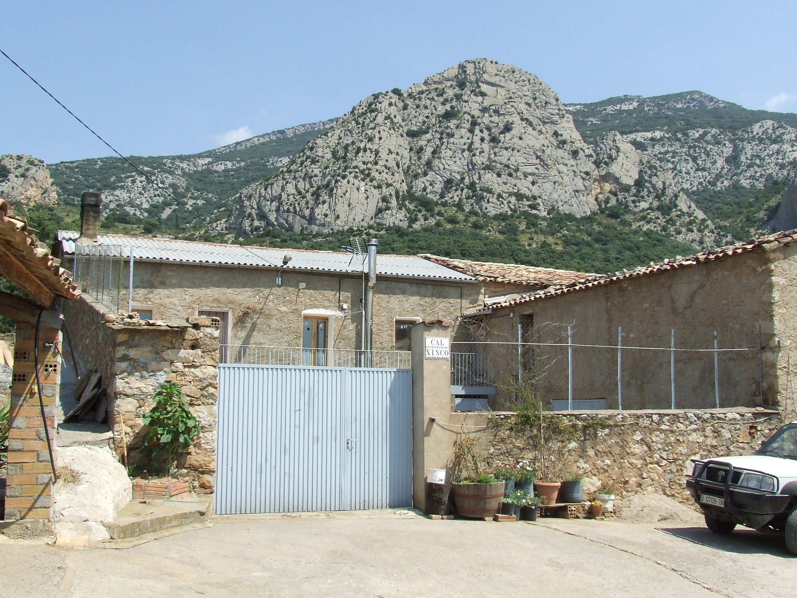 Casa Xinco (Abella de la Conca, Pallars Jussà))